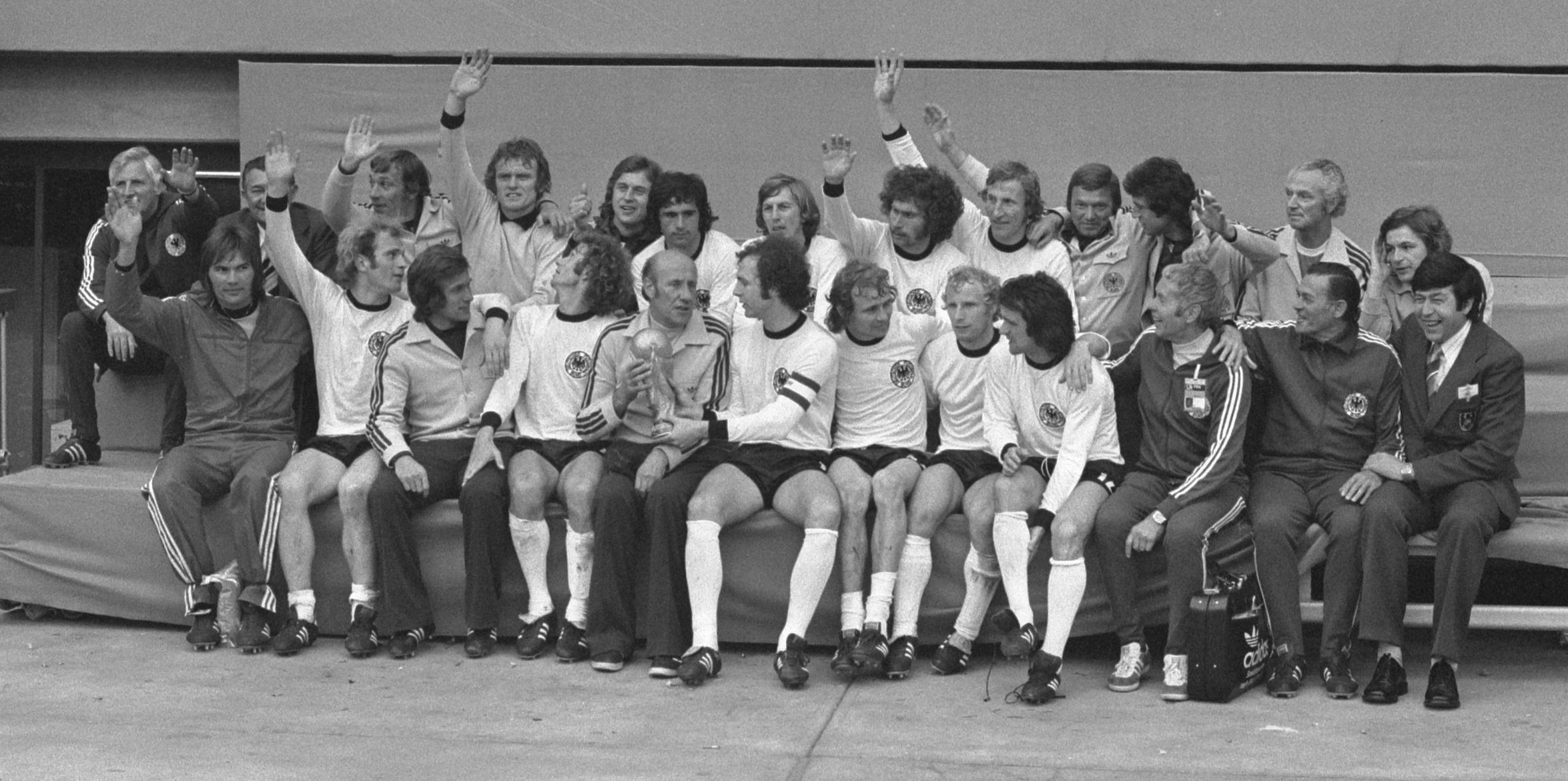 Collectie / Archief : Fotocollectie Anefo Reportage / Serie : [ onbekend ] Beschrijving : Finale wereldkampioenschap voetbal 1974 in Munchen, West Duitsland tegen Nederland 2-1; Duitse elftal met wereldbeker Datum : 7 juli 1974 Locatie : München, Nederland, West-Duitsland Trefwoorden : elftallen, finales, sport, voetbal, wereldkampioenschappen Fotograaf : Verhoeff, Bert / Anefo Auteursrechthebbende : Nationaal Archief Materiaalsoort : Negatief (zwart/wit) Nummer archiefinventaris : bekijk toegang 2.24.01.05 Bestanddeelnummer : 927-3097